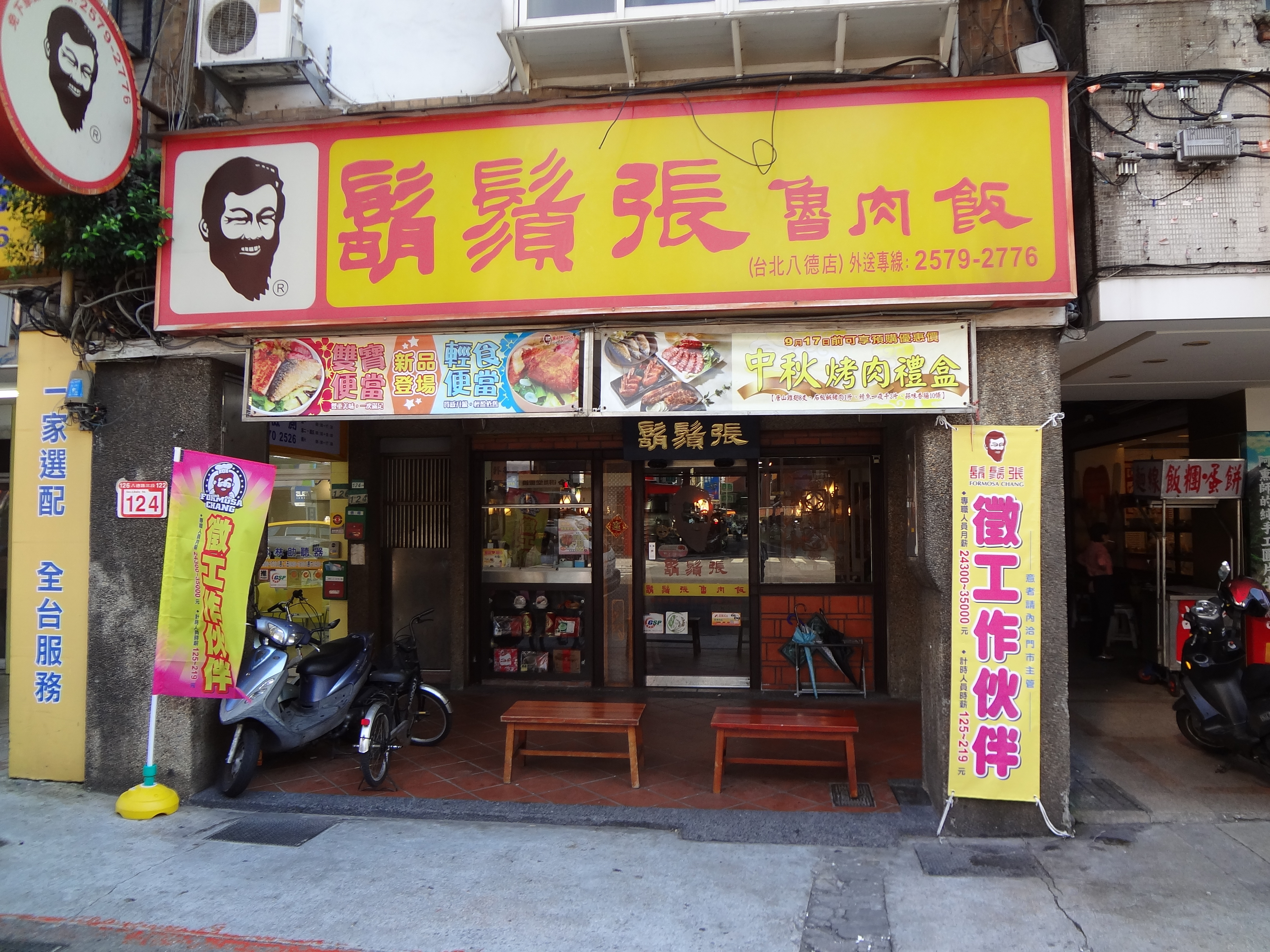 鬍鬚張台北八德店，位於臺北市松山區八德路三段124號1樓，大門兩側掛「徵工作夥伴」旗幟與布條。